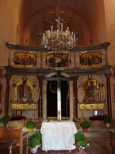 Церква Святих Ясона і Сосіпатра (Керкіра)